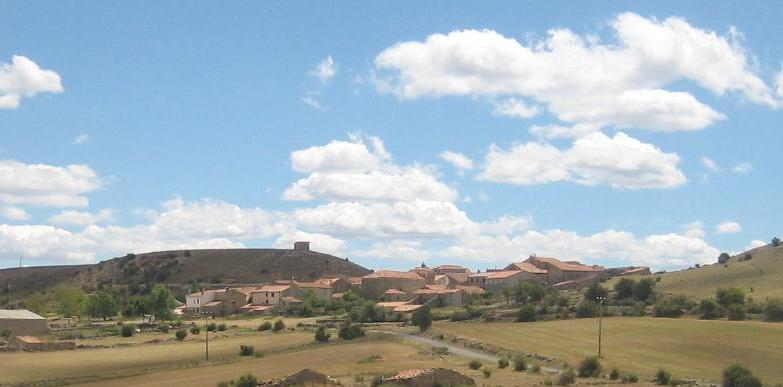 Clares desde San Roque